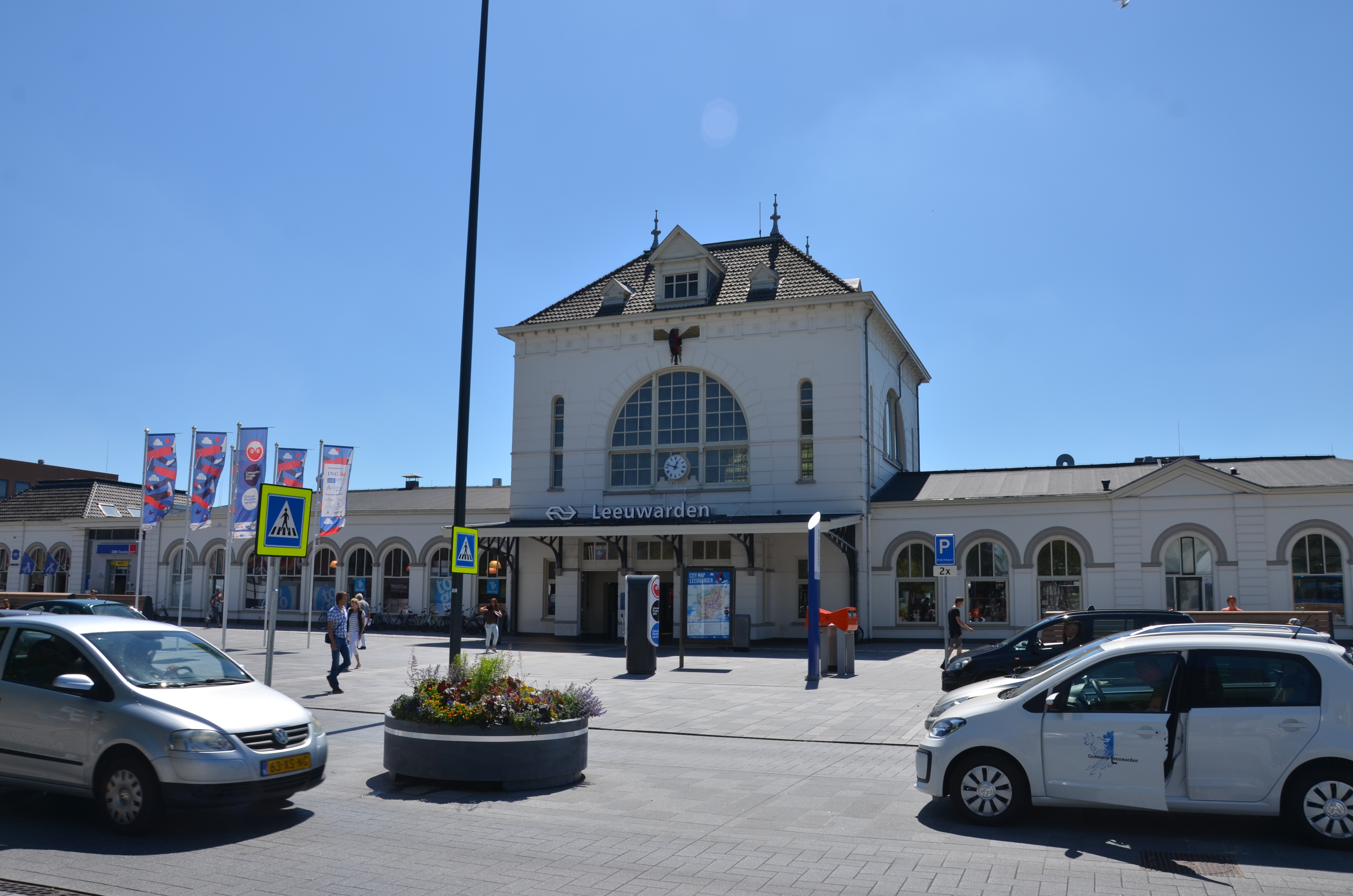 Station Leeuwarden.